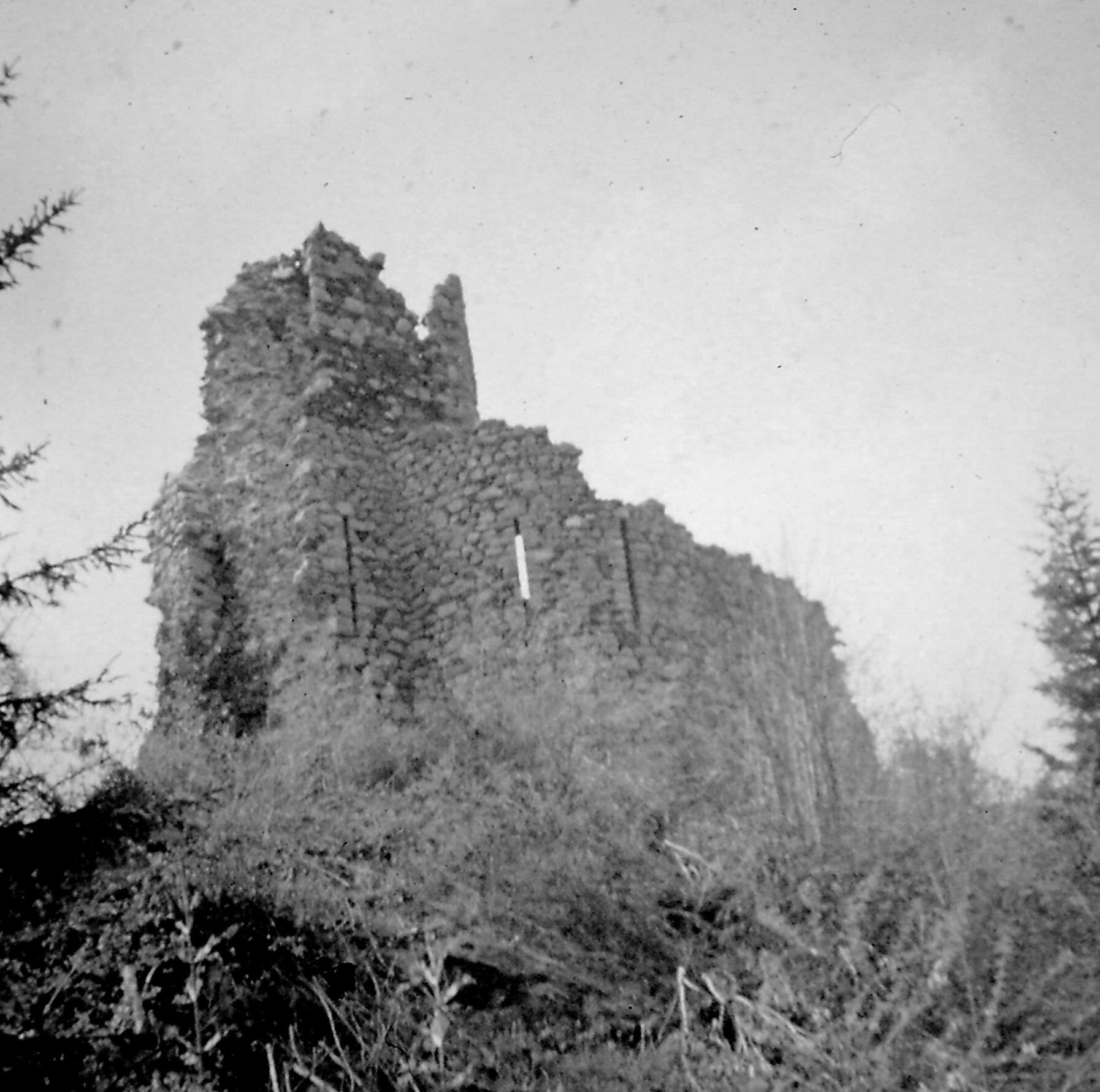 Vue du château en 1970 avant l'écroulement du donjon qui a moticé une vaste campagne de restauration.